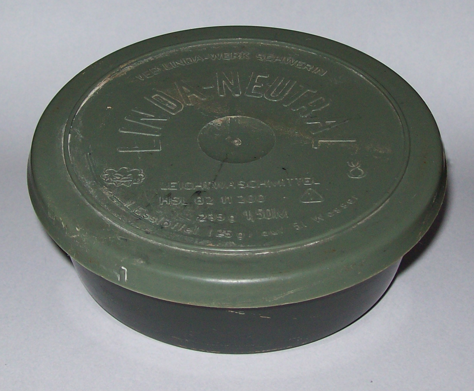 Linda-Neutral-Leichtwaschmittel, Menge: 235 g, Preis: 1,50 M